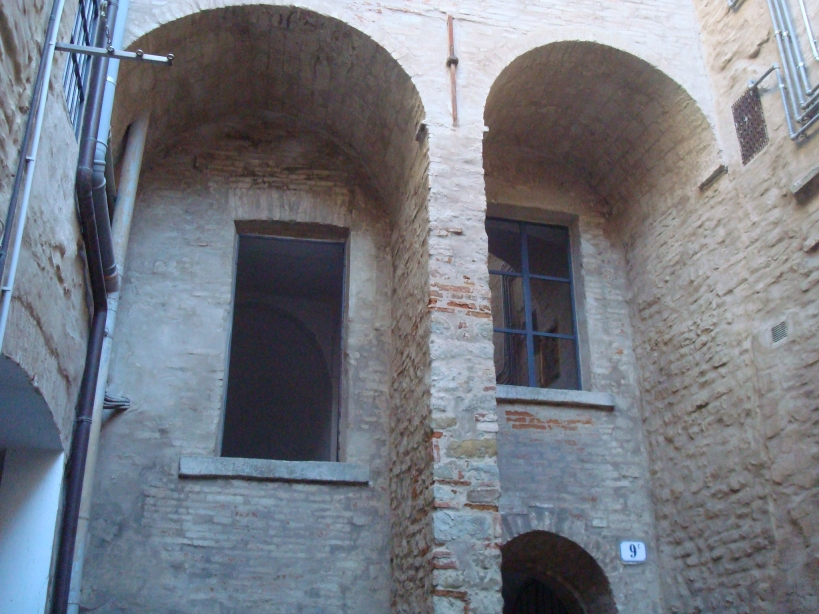 Modigliana (Faenza,Italie), palazzo Papiani dans le bourg ancien